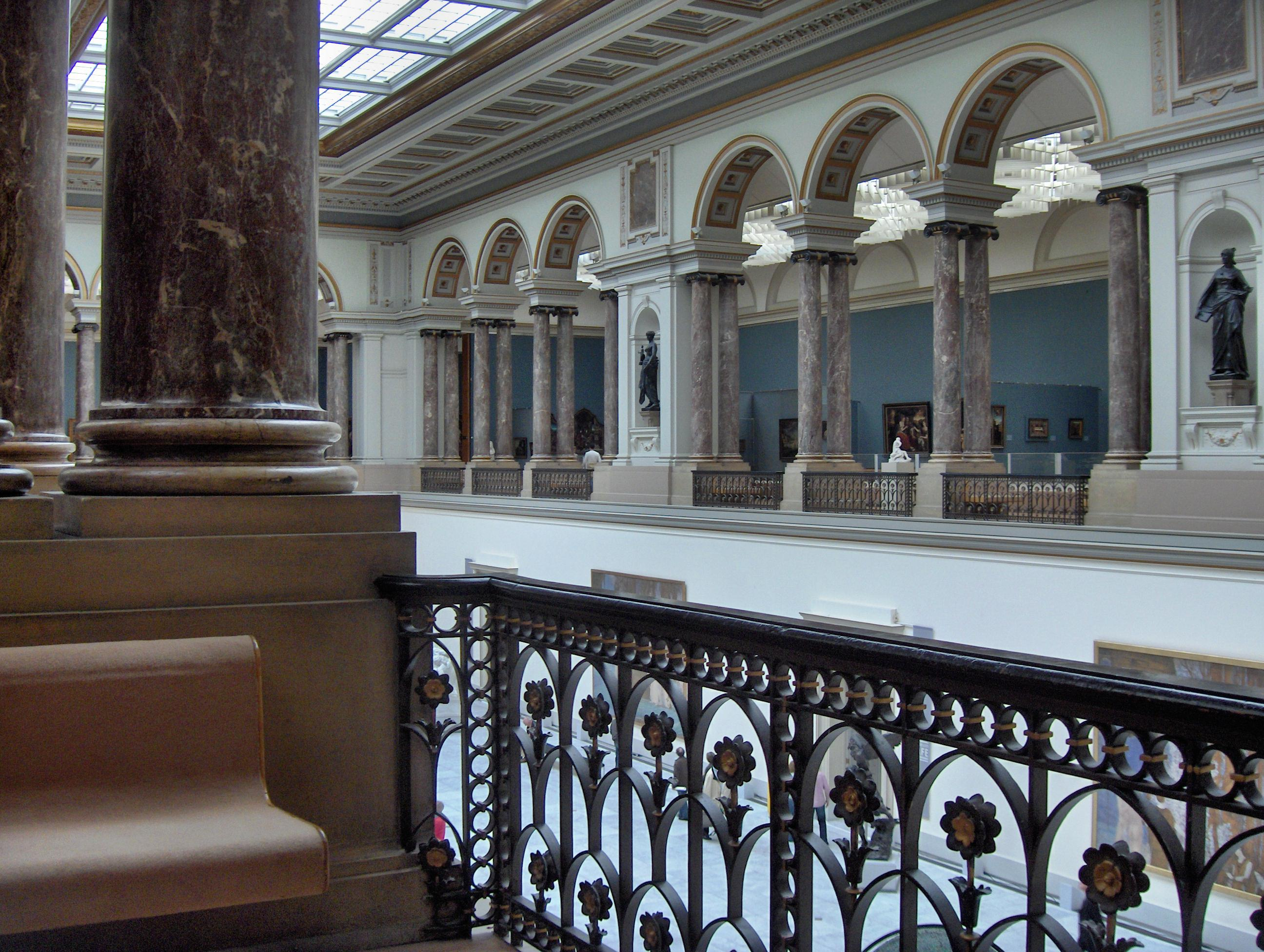 Zicht op de bovenverdieping van de KMSKB, Brussel